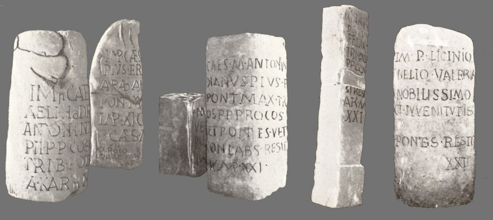 Römische Meilensteine, gefunden in Schwechat, Österreich.